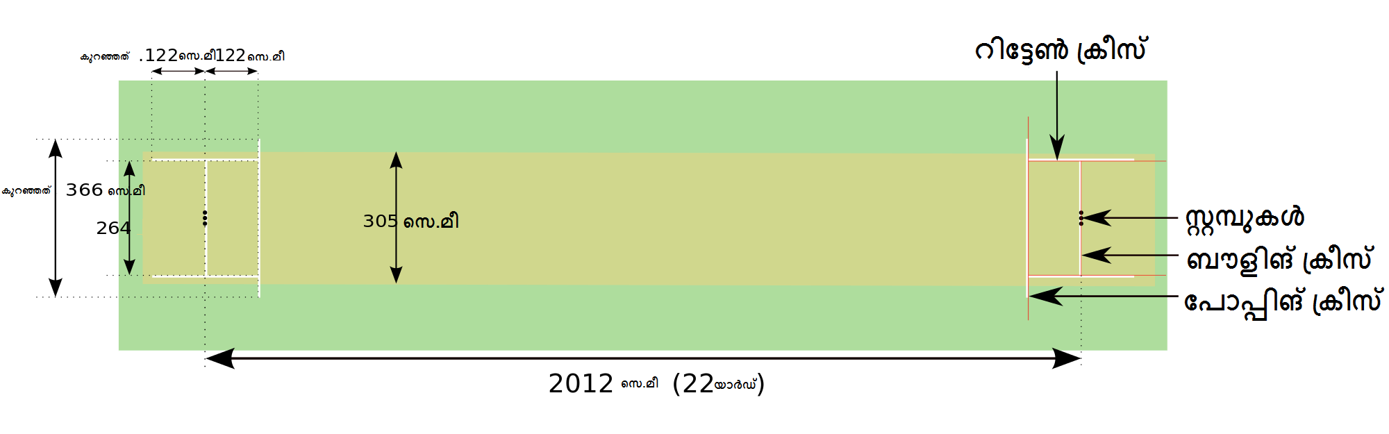 ക്രിക്കറ്റ് പിച്ചിന്റെ അളവുകൾ